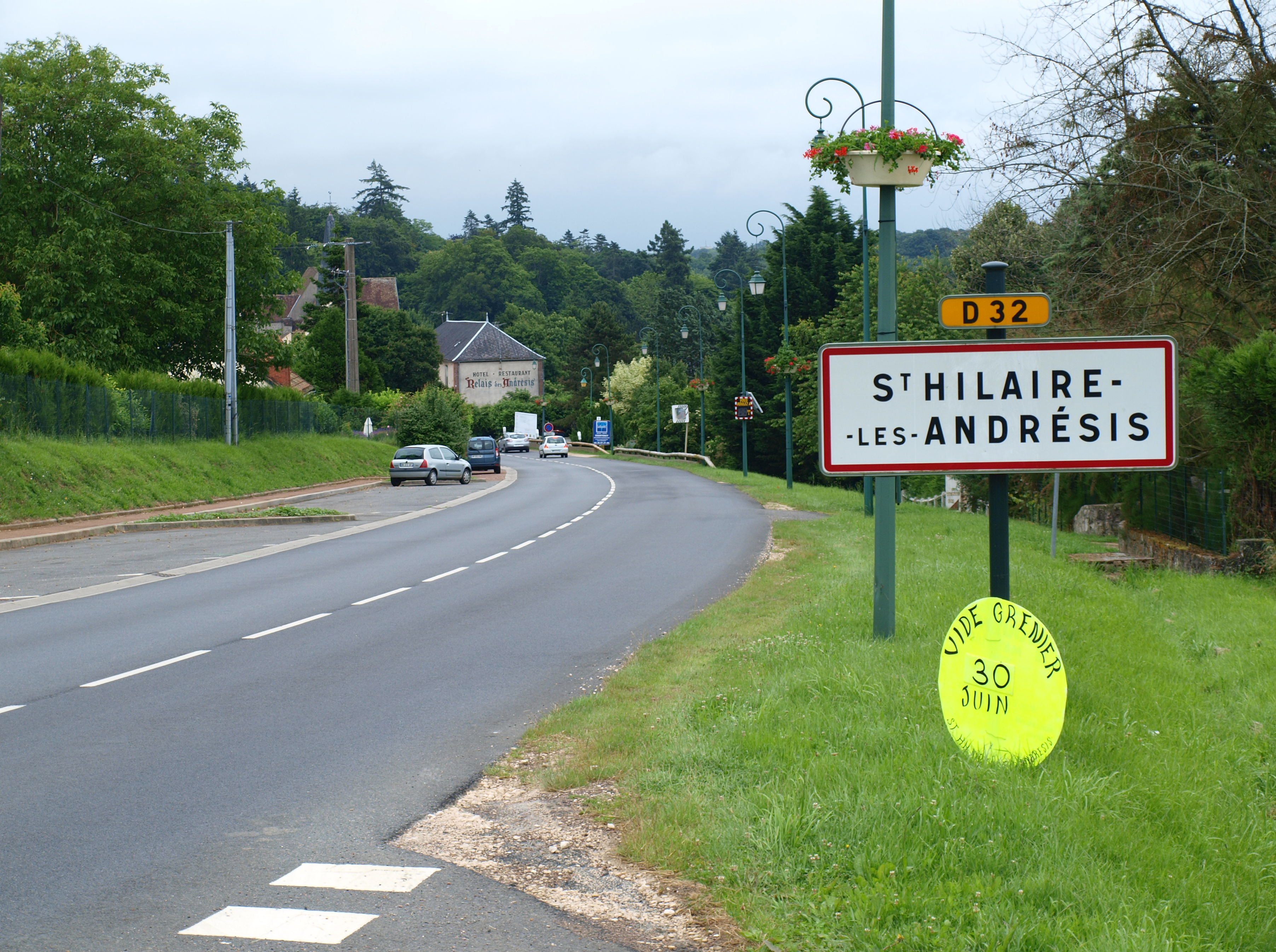 Saint-Hilaire-les-Andrésis (Loiret, France) , entrée du village en venant de Courtemaux